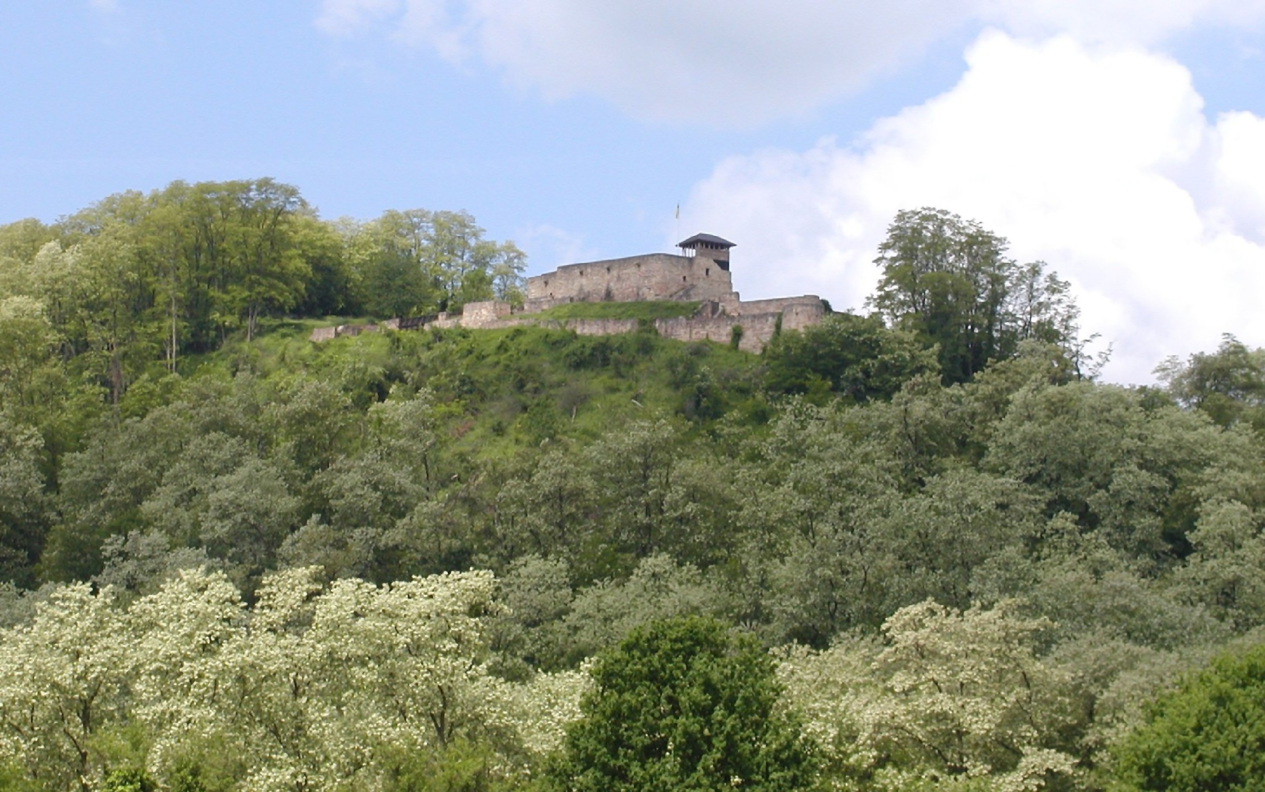 Teufelsburg (Burg Neufelsberg) in Felsberg in der Akkatzienblüte